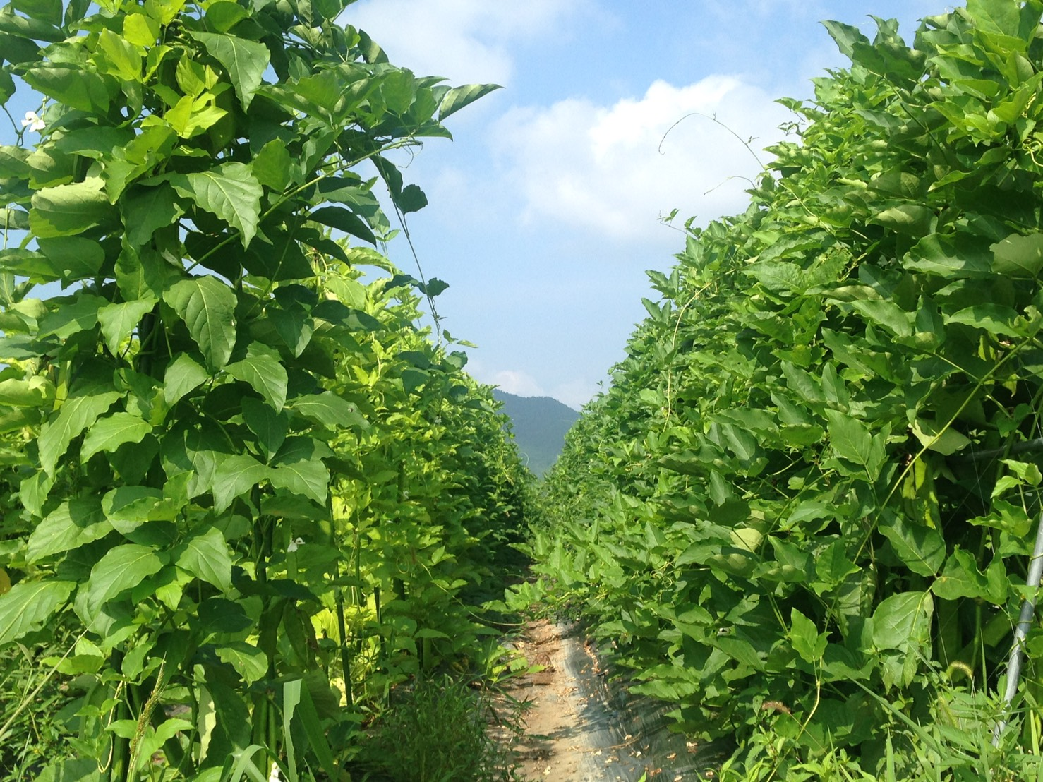 Canavalia gladiata 丹波市こやま園農場